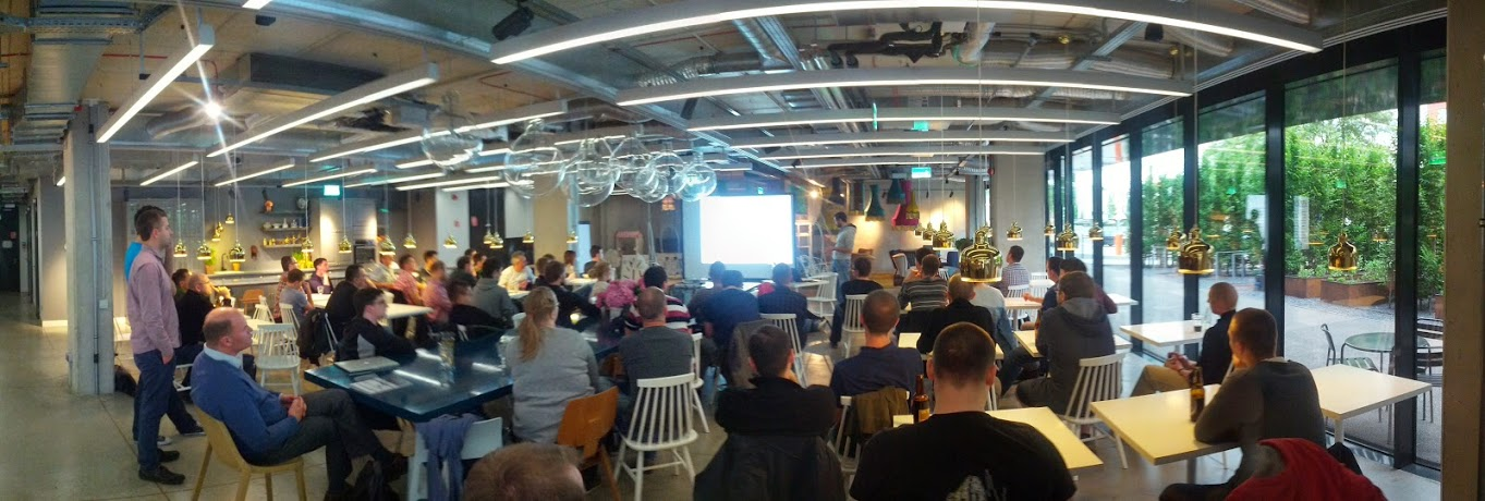 Spotkanie Java User Group, „Docker – intro to a revolution” Marek Goldmann, Biurowiec Pixel, ul. Grunwaldzka, Poznań, Polska